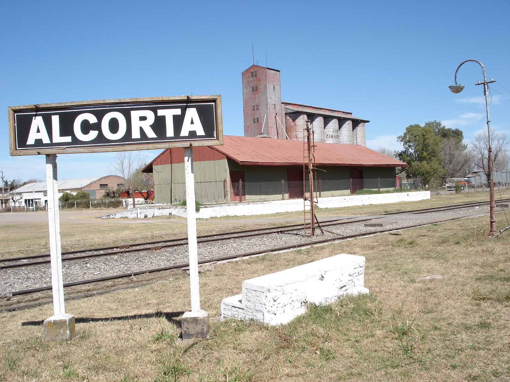 Vista del pueblo de Alcorta, Provincia de Santa Fe. Autor: Nelson Lisandro Mariani G. / AR «trabajo propio (own work)».